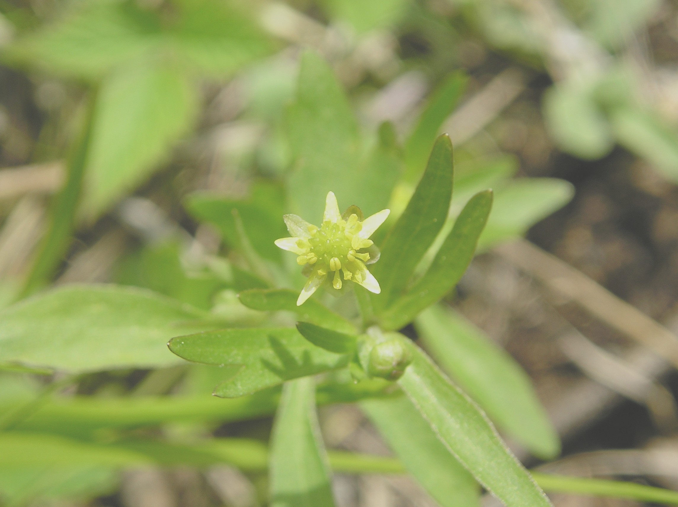 Ranunculus_abortivus_2-eheep